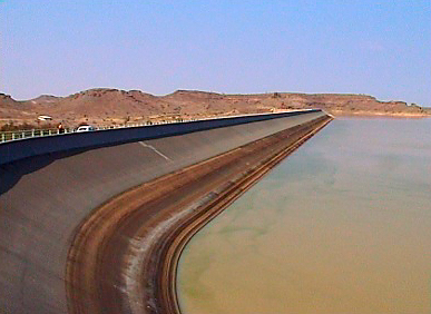 Hardap-Damm, Namibia 1998